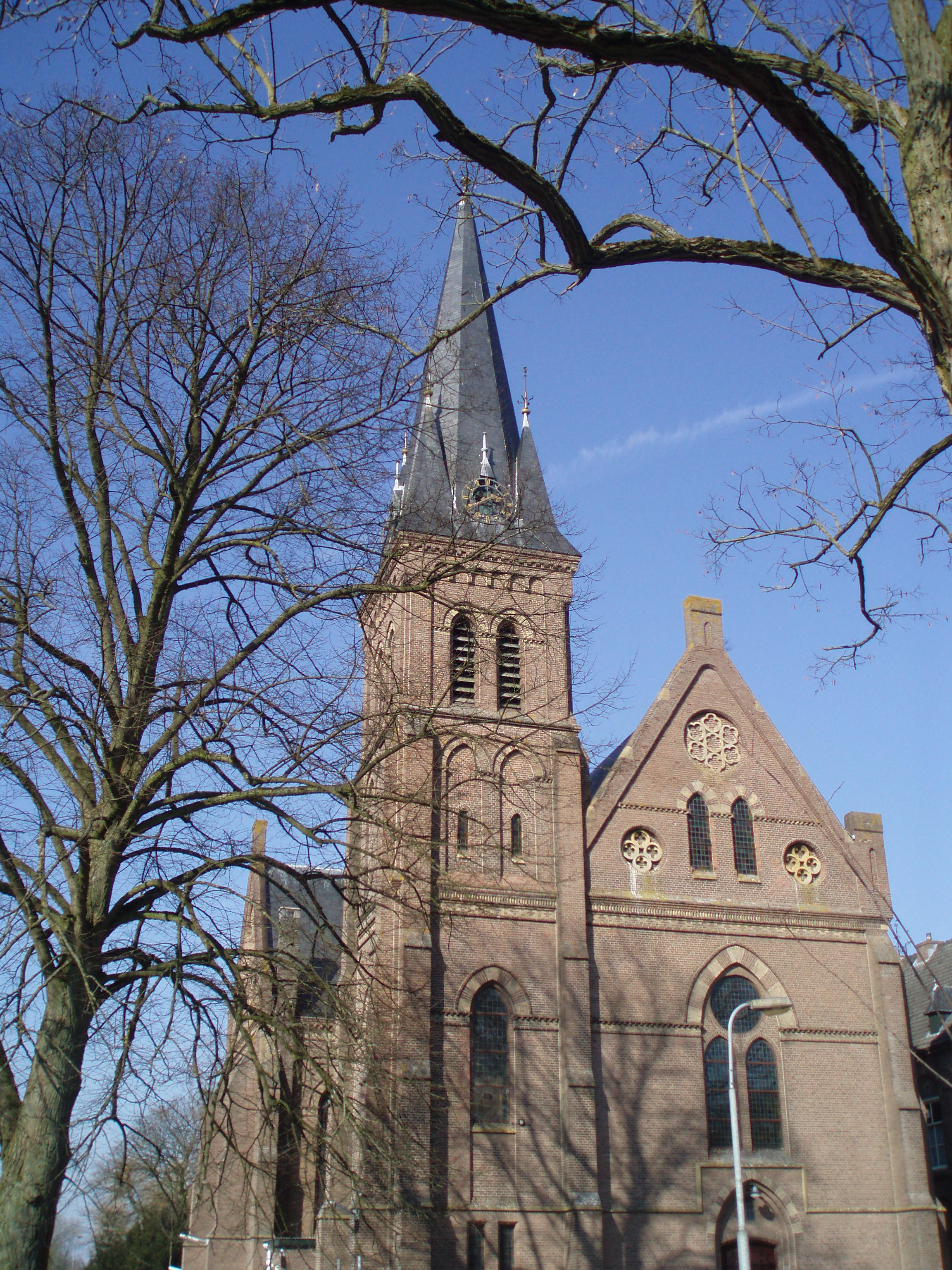 Onze Lieve Vrouw Onbevlekt Ontvangen Kerk in Wijhe.